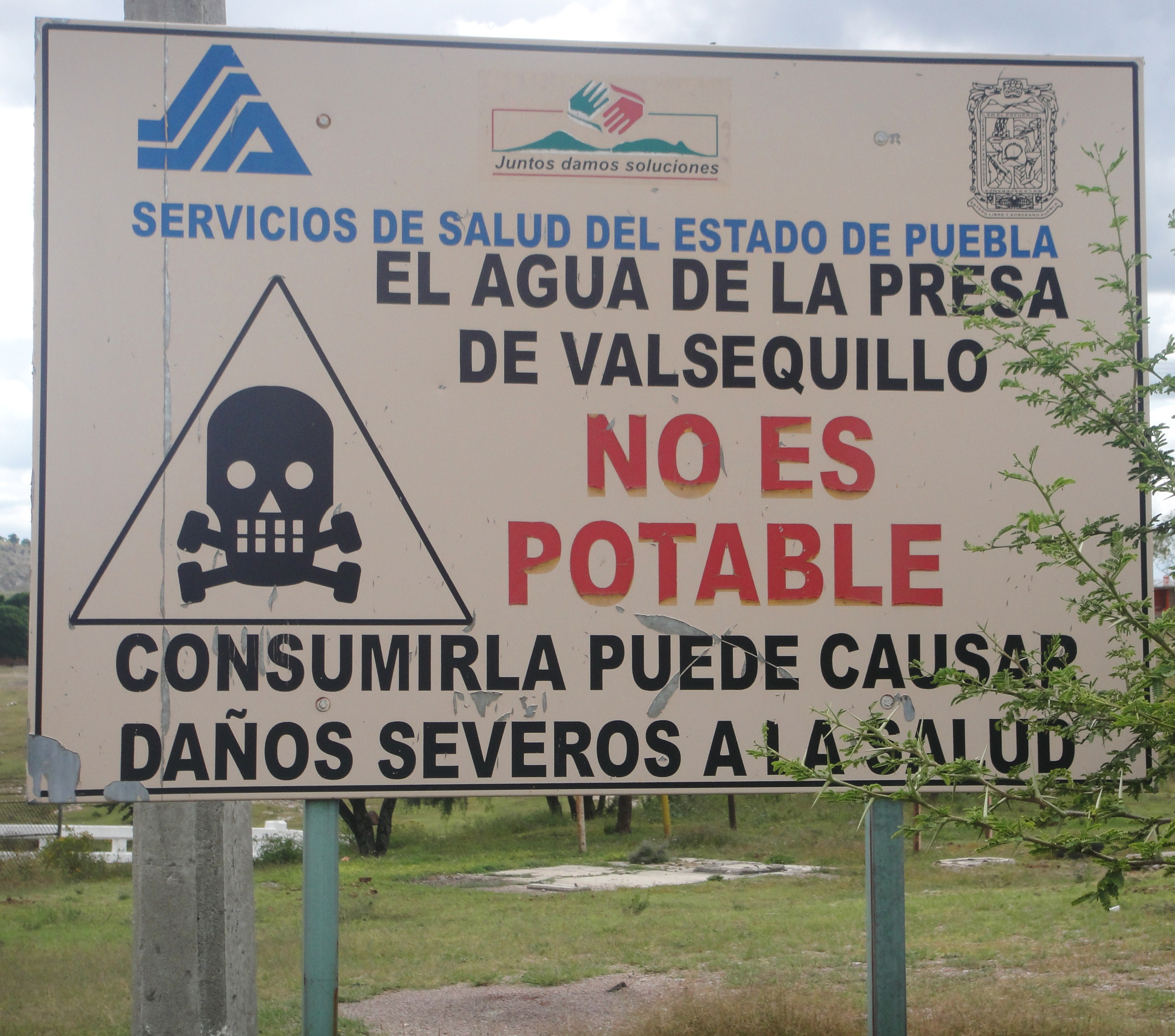 El agua de la presa de Valsequillo no es potable